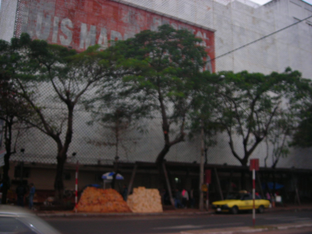 emergencia